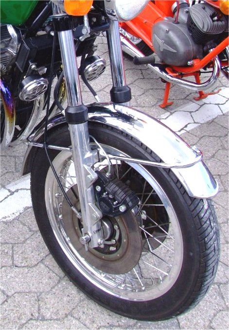 Laverda 1000 3C del 1974 - Particolare dell'anteriore con forcella teleidraulica Ceriani e doppio disco Brembo